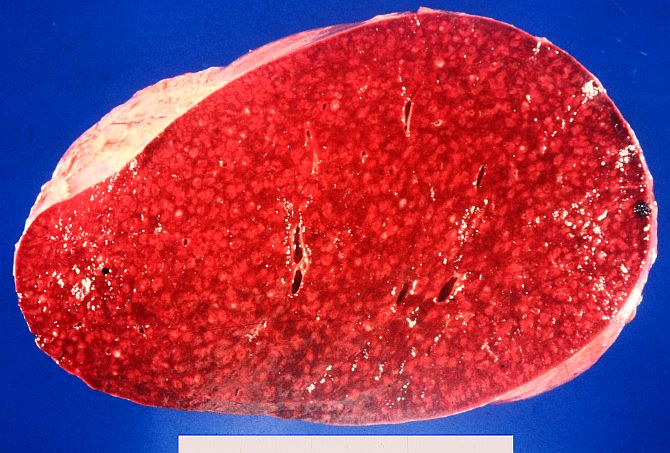 Esplenomegàlia i hiperplàsia linfoide folicular reactiva en un cas de malaltia immune.